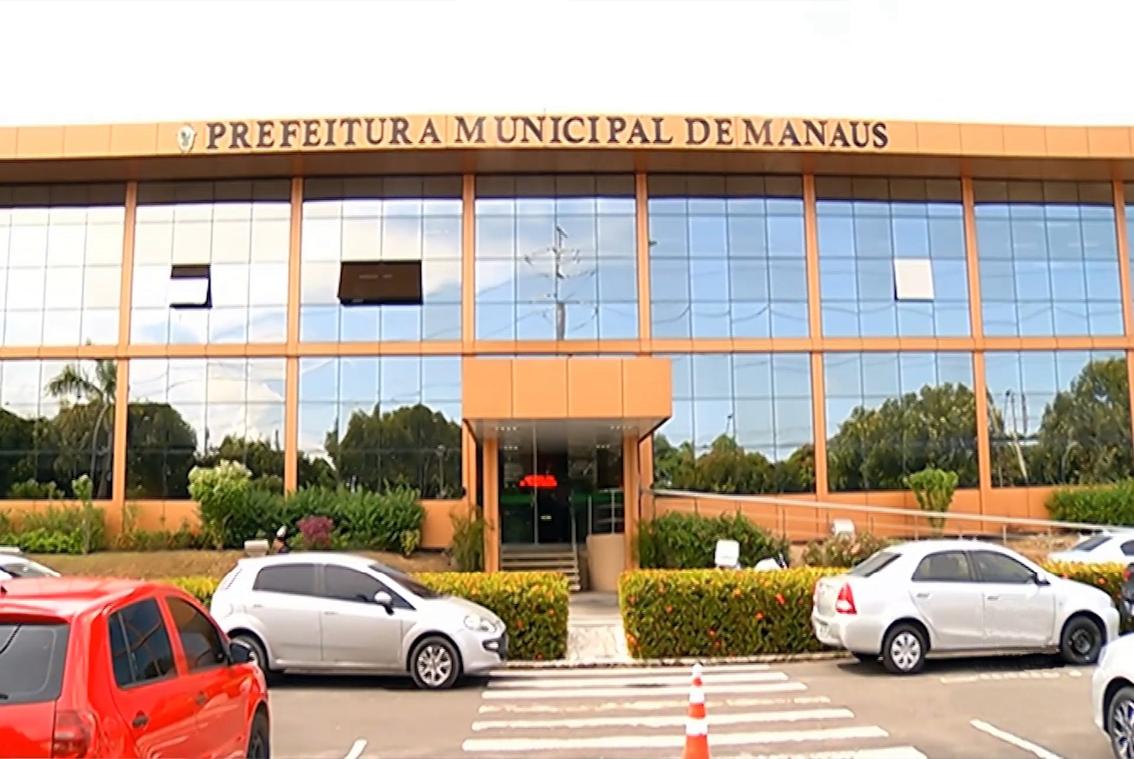 Sede da Prefeitura Municipal de Manaus, capital do Estado do Amazonas.